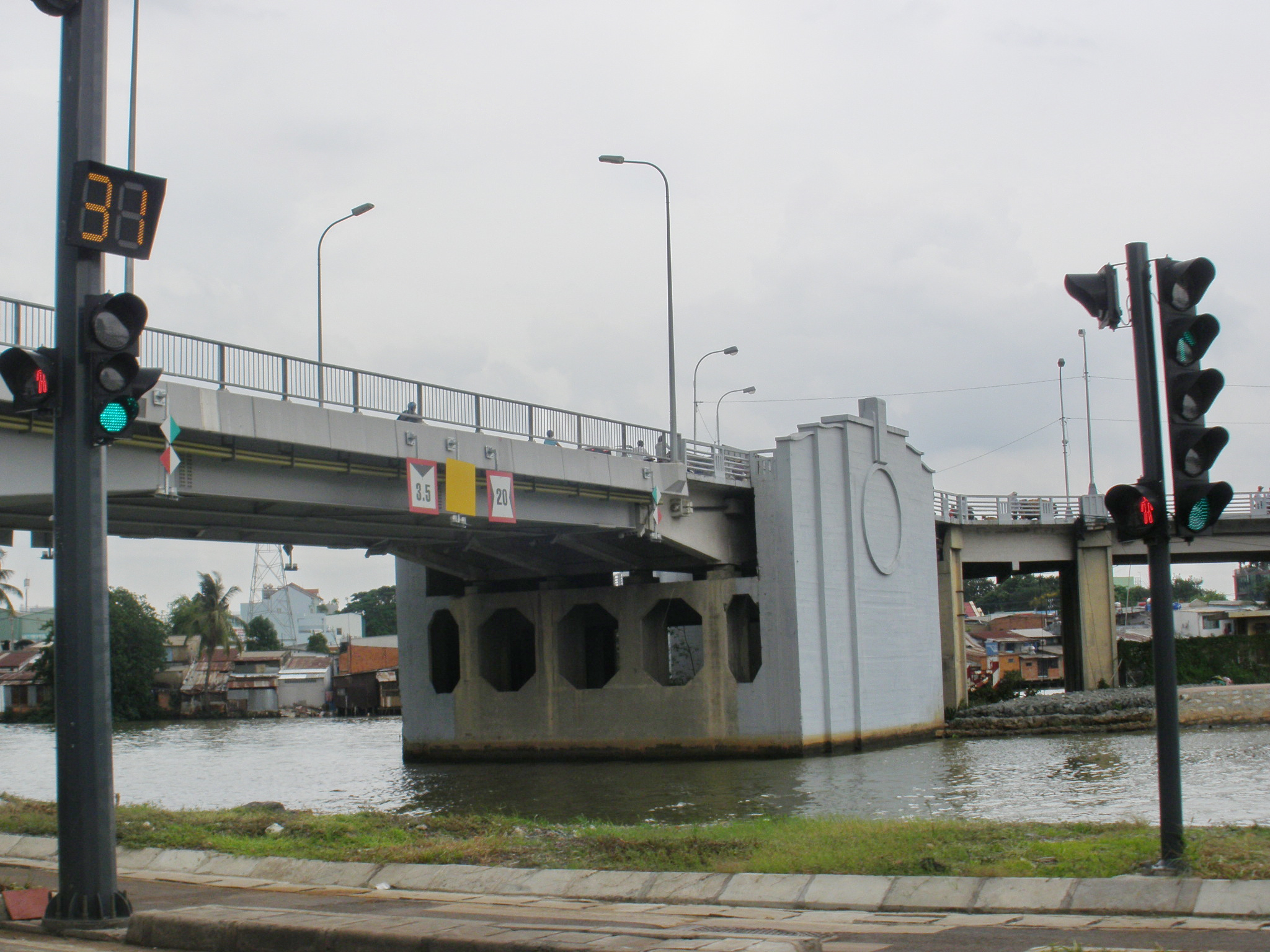 Cầu Chử y-Đi qua quận 8, hcm